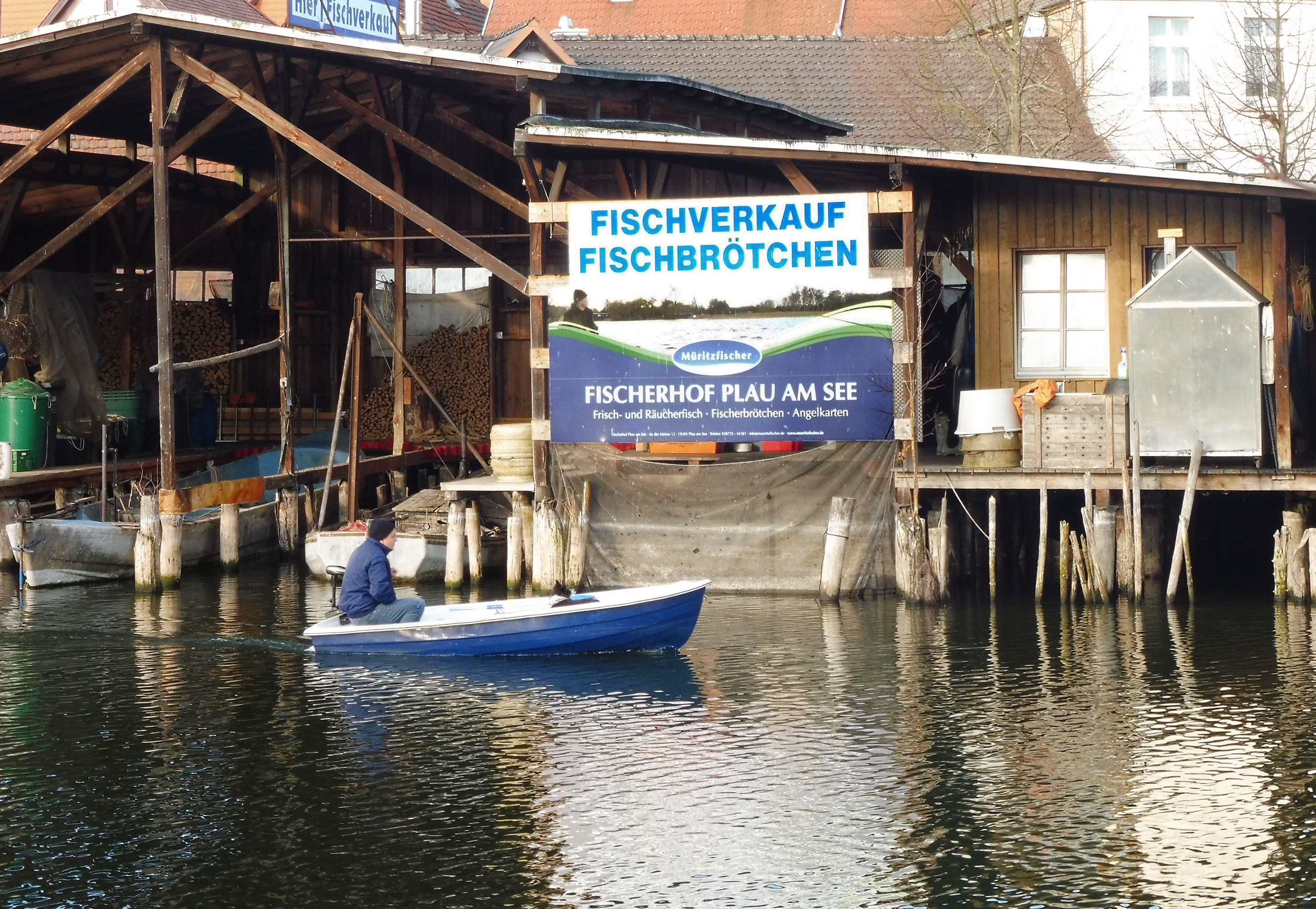 Fischhändler an der Elde in Plau am See